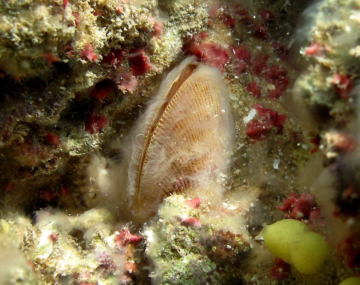 Un bivalve Acrosterigma discus (couverte par du mycélium de champignon marin) à la Réunion.